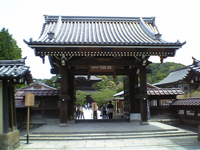 巨福山建長寺総門 投稿者撮影